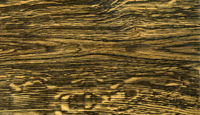 Браширование